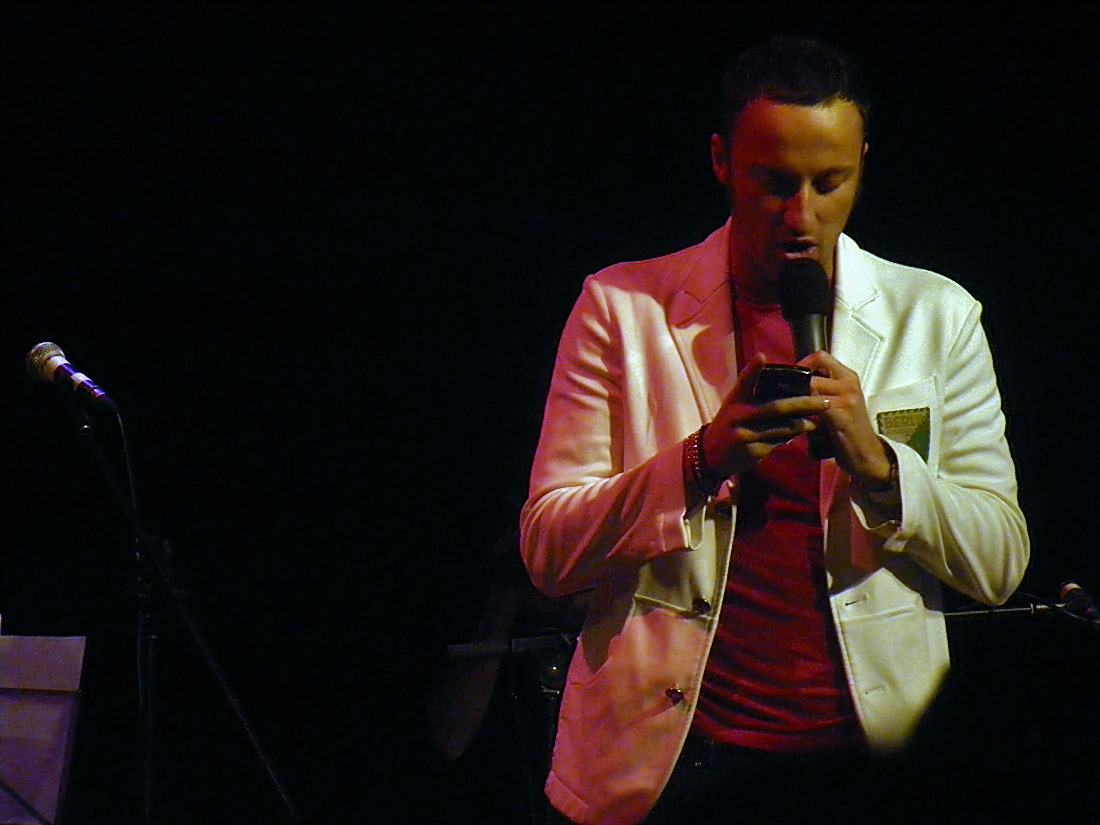 Il conduttore televisivo Francesco Facchinetti